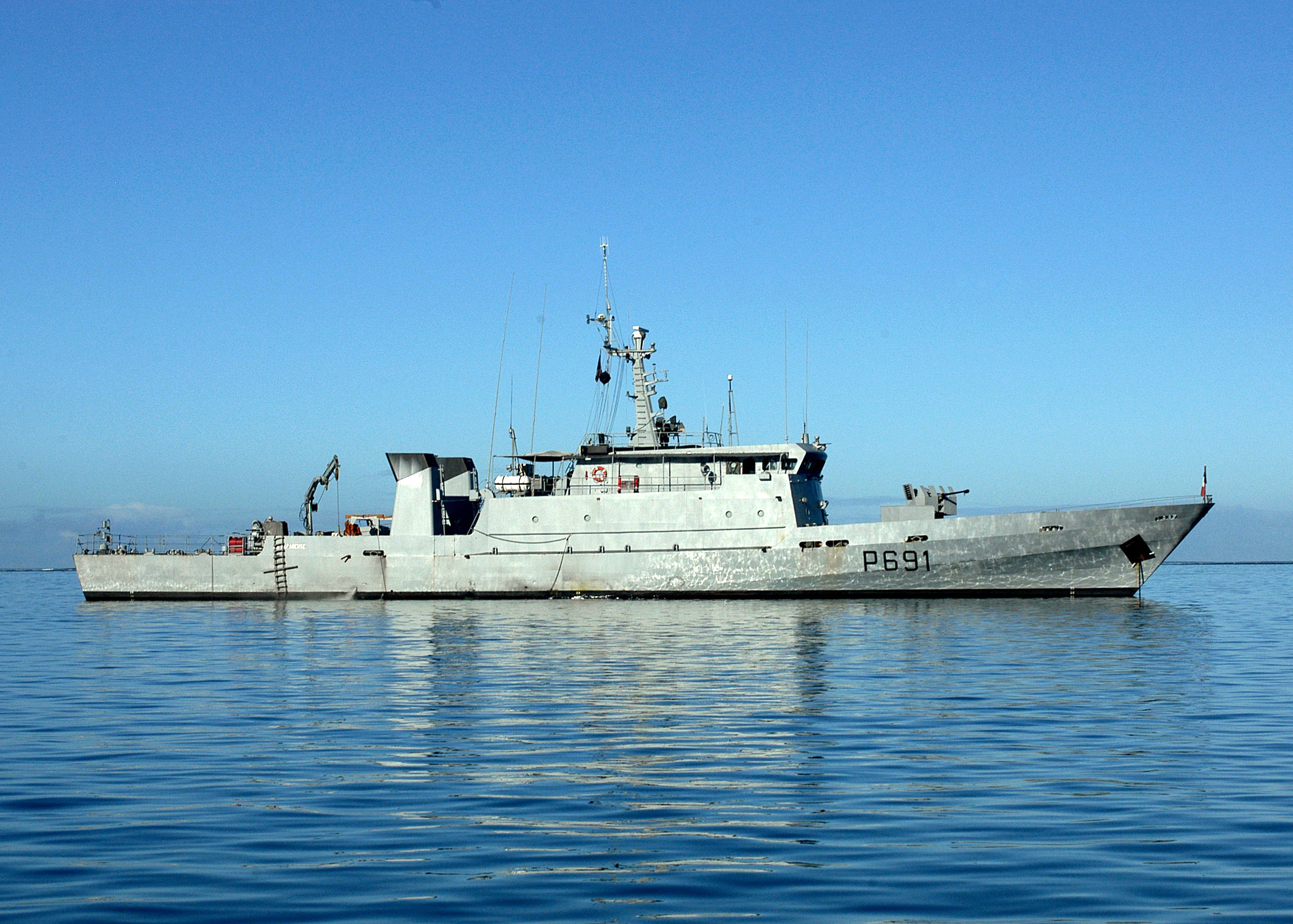 Patrouilleur P400 La Tapageuse